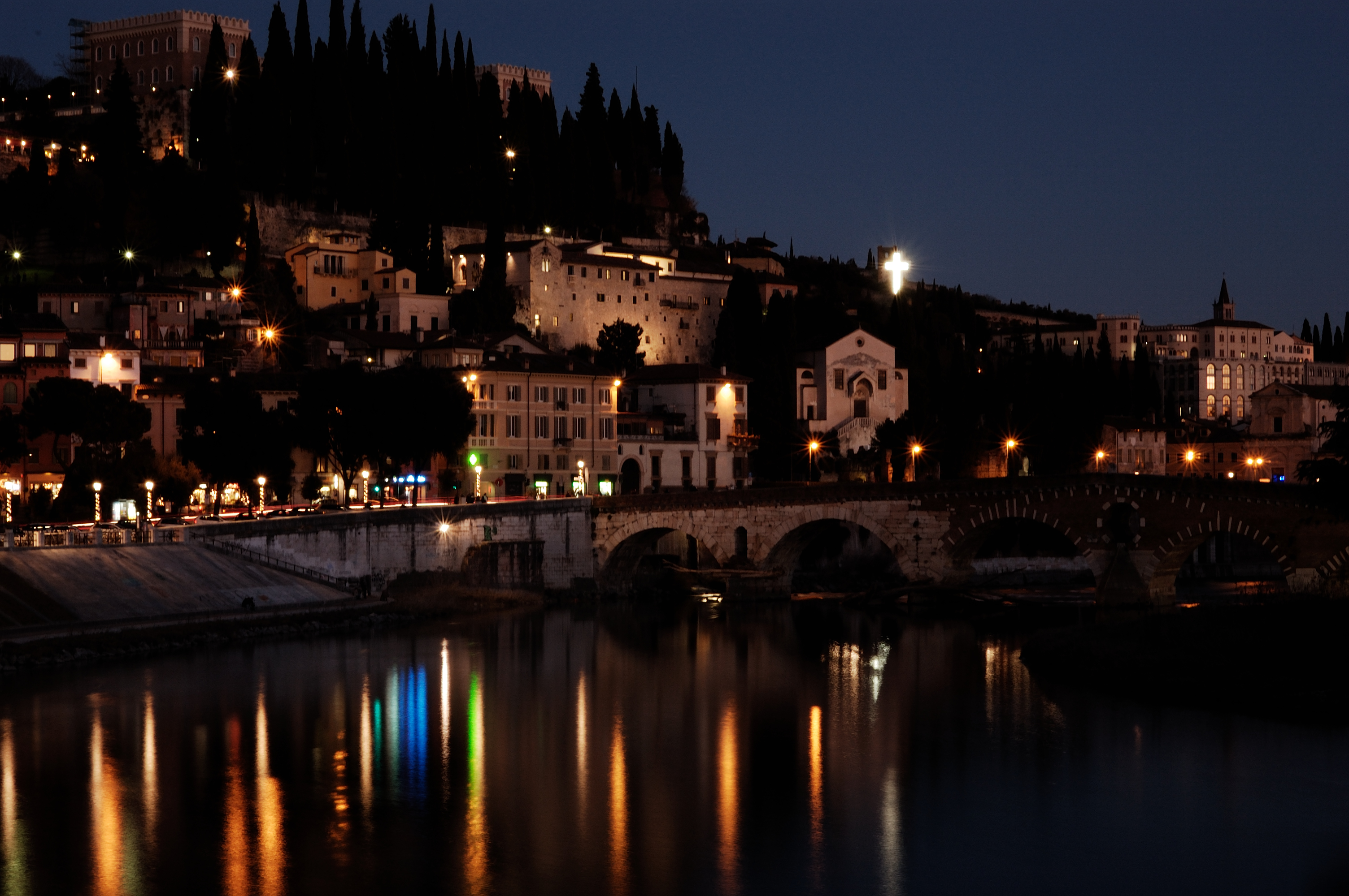 Colle San Pietro (con l'omonima chiesa) e Ponte Pietra di notte, visto da Lungadige San Giorgio - Verona